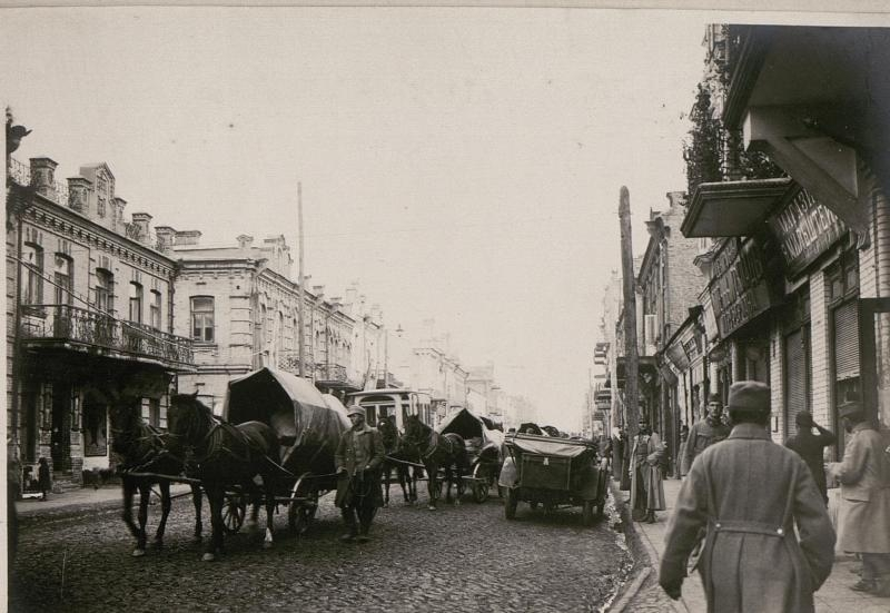 Вулиця у Луцьку на поч. 20 ст.